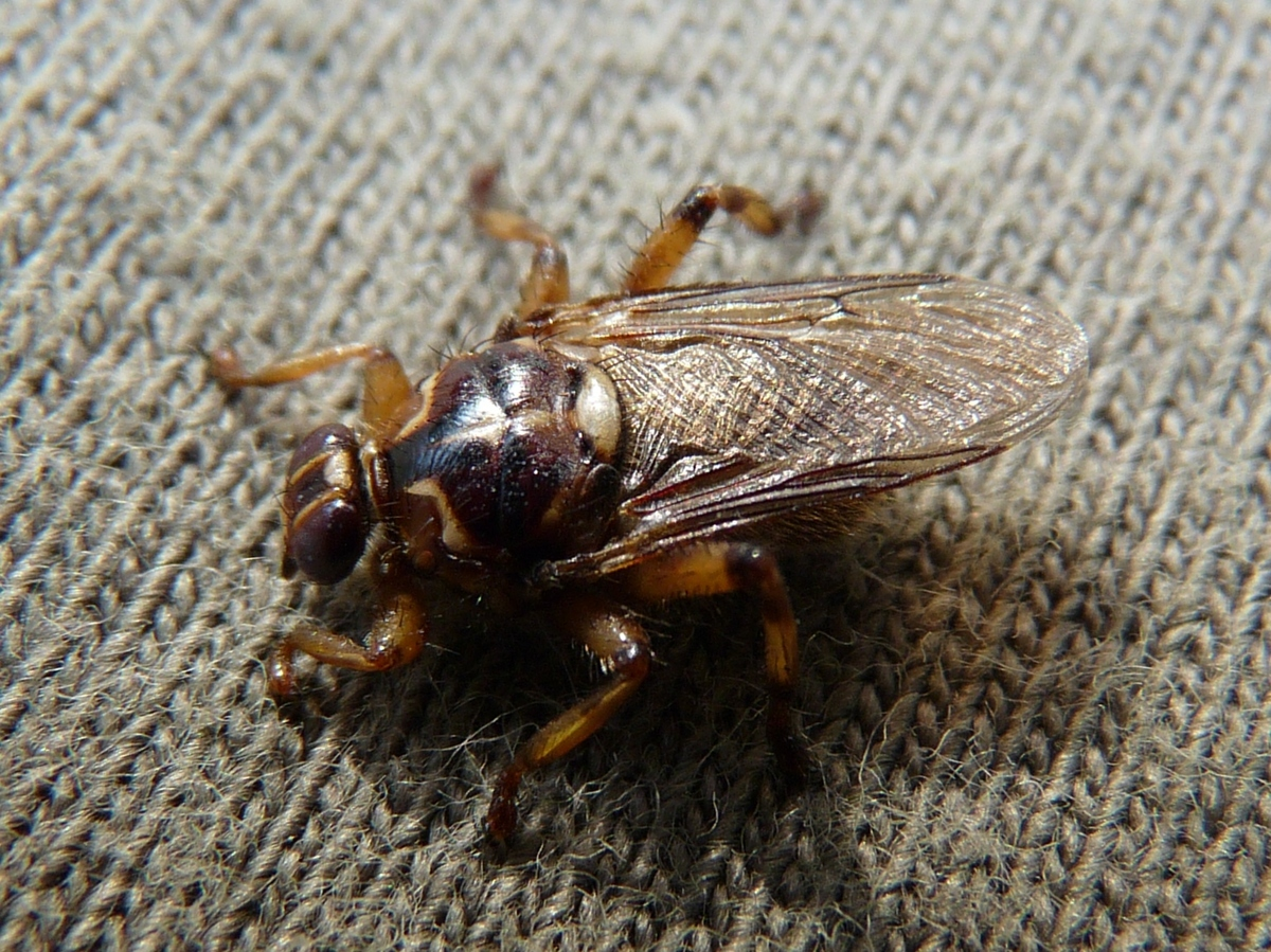 Paardenluisvlieg (Hippobosca equina).